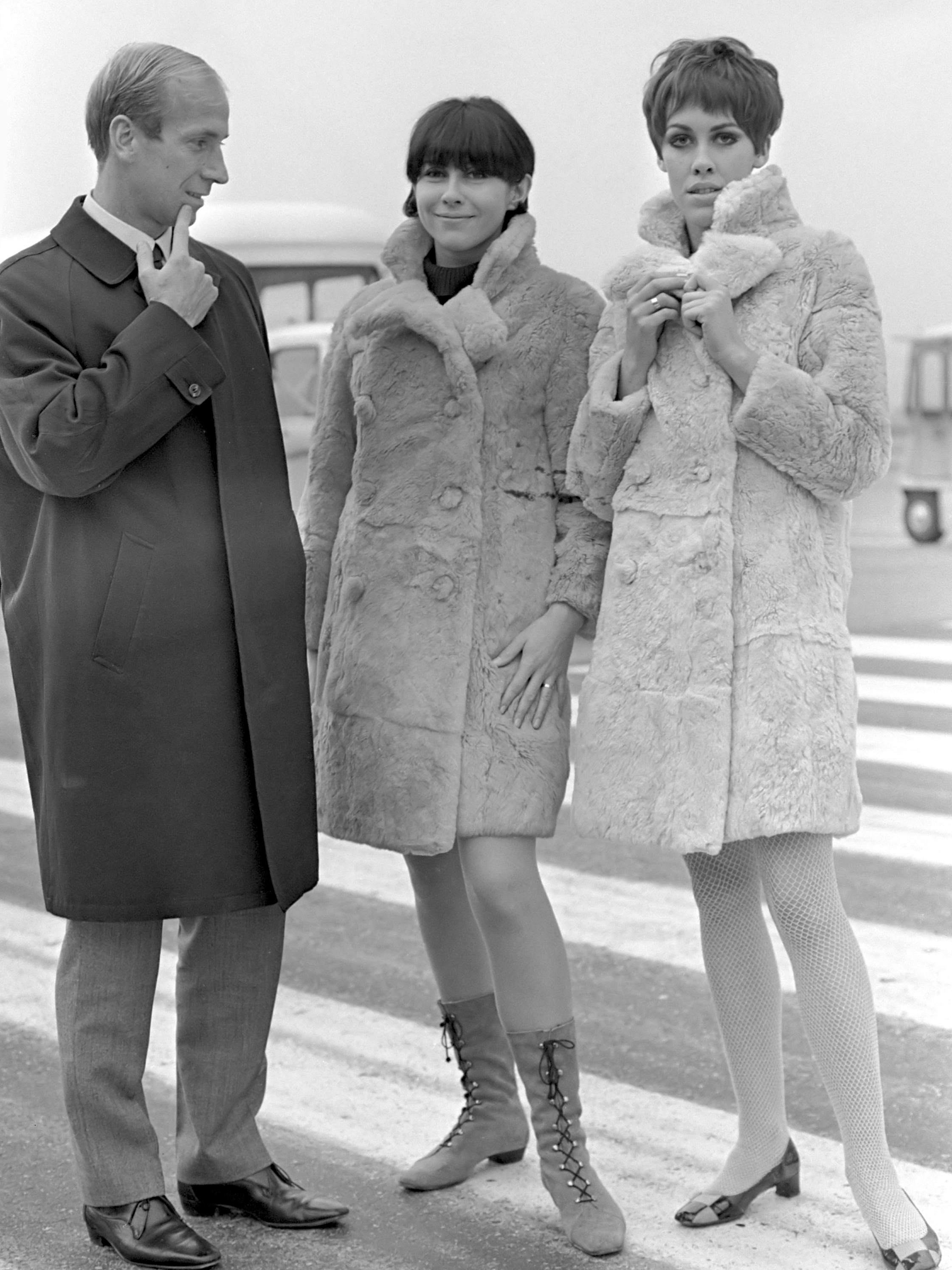 Aankomst op Schiphol van de voetballer Bobby Charlton en twee Britse mannequins, die aanwezig zullen zijn bij de opening van het London-House aan de Vijzelgracht te Amsterdam 24 oktober 1966